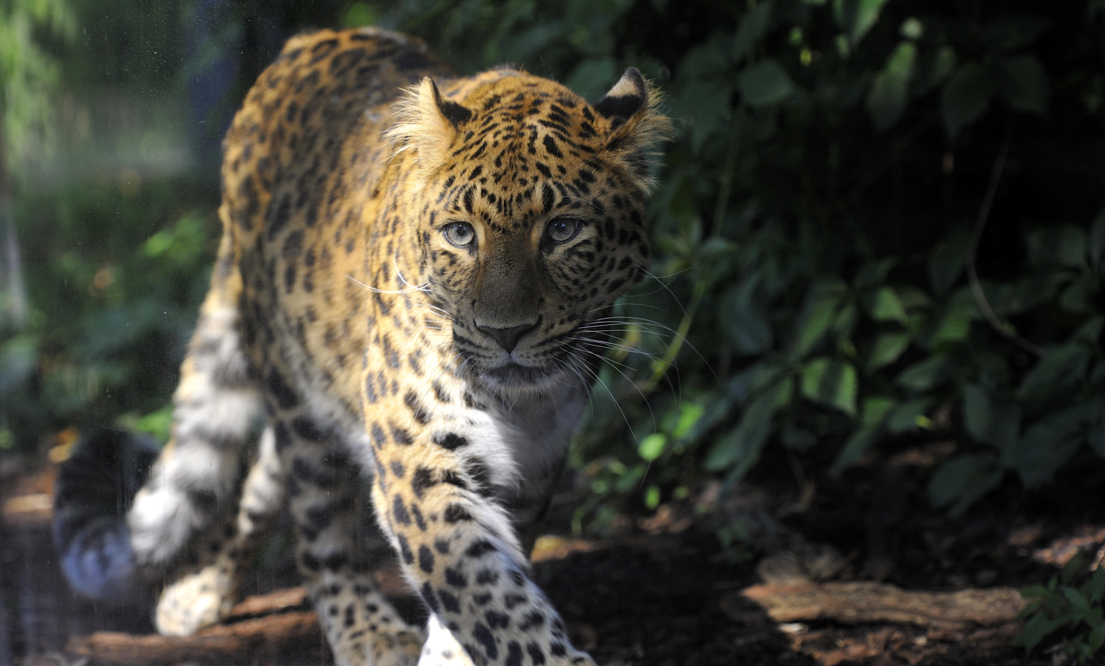 MÉNAGERIE Ménagerie du Jardin des Plantes, Paris, France.